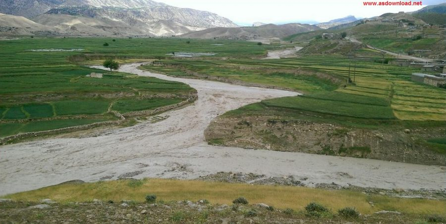 روستای دره بنیاب در یک روز بارانی و جاری شدن رودخانه ها